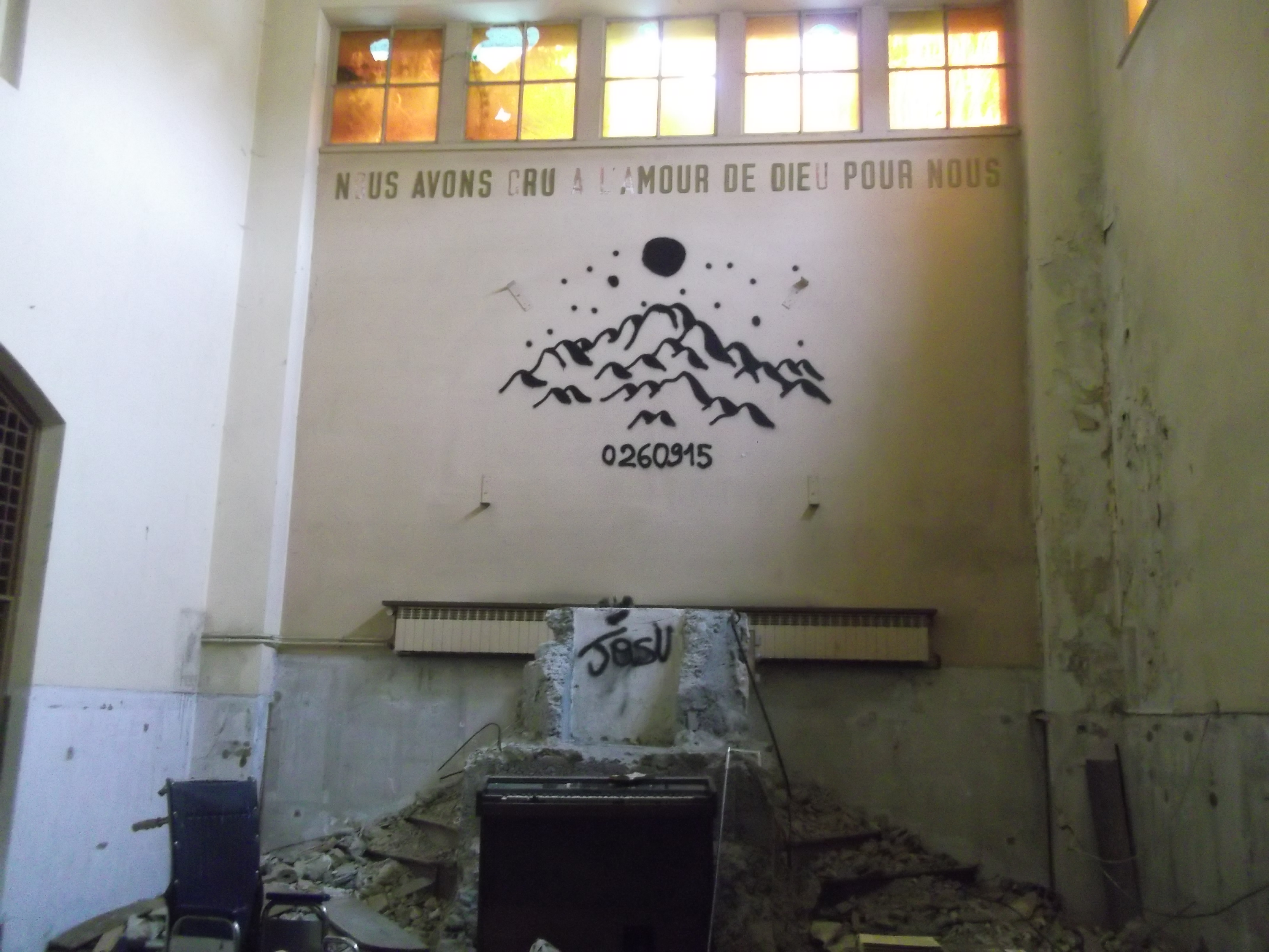 Intérieur de la chapelle du Couvent de la Visitation de Vif, Isère.